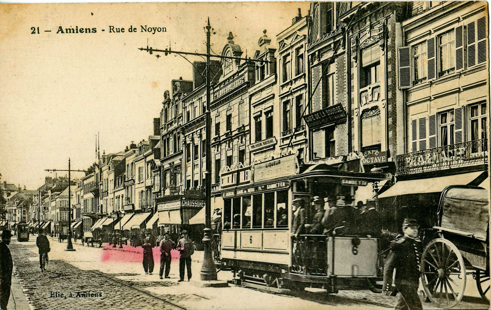 Carte postale ancienne éditée par Elie à Amiens, n°21 Amiens - Rue de Noyon. Vue en gros plan d'une rame du Tramway d'Amiens